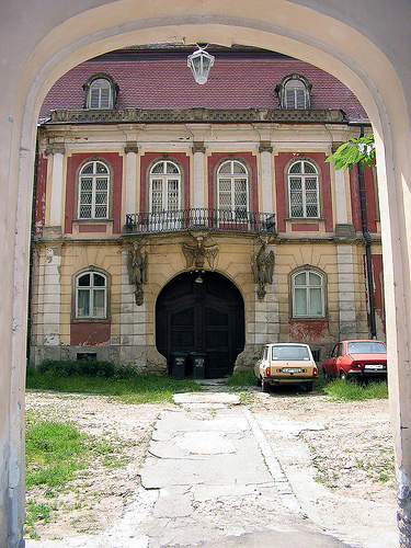 Cluj-Napoca, curtea Palatului Bánffy (Muzeul de Artă), Piaţa Unirii nr.30